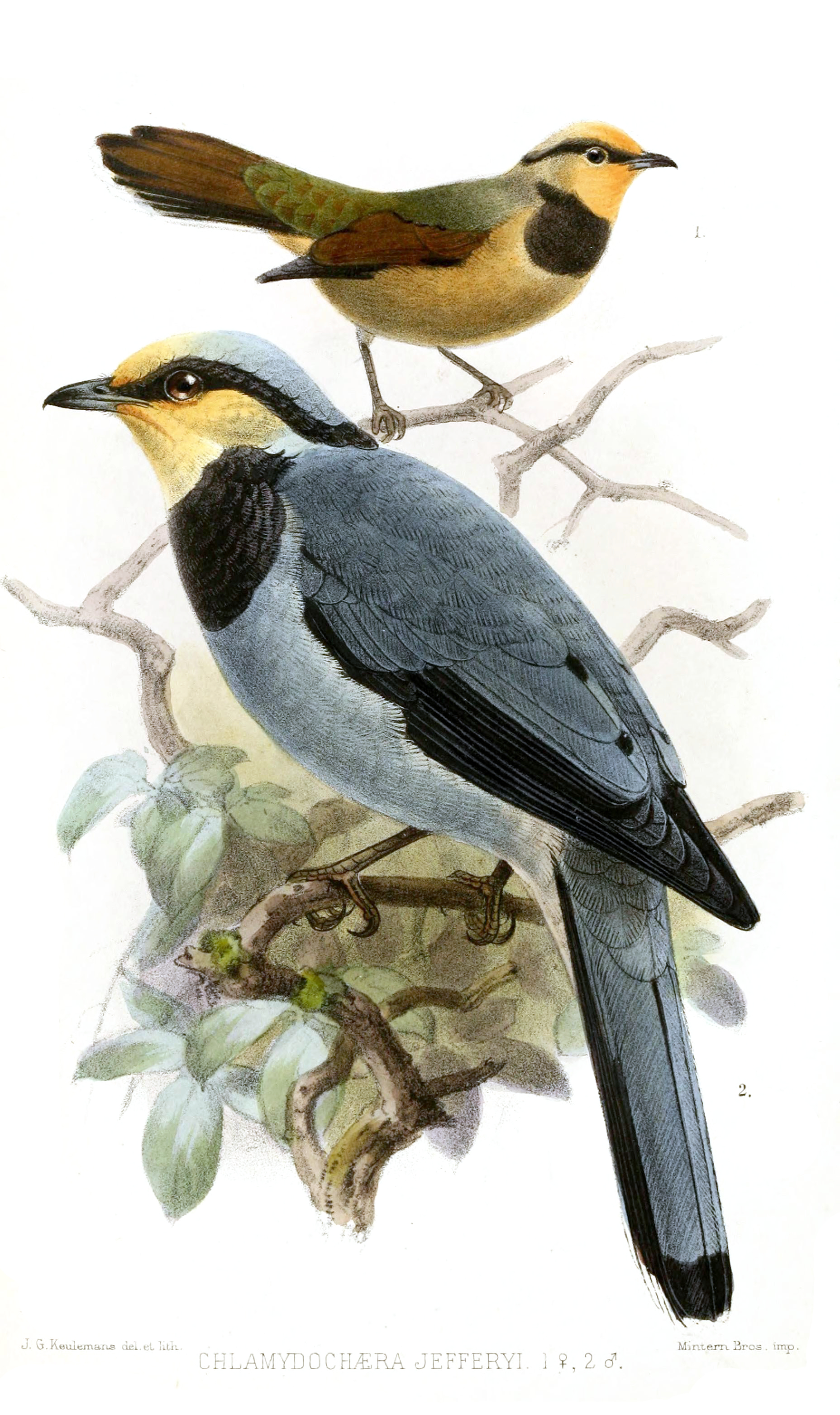 Chlamydochaera jefferyi